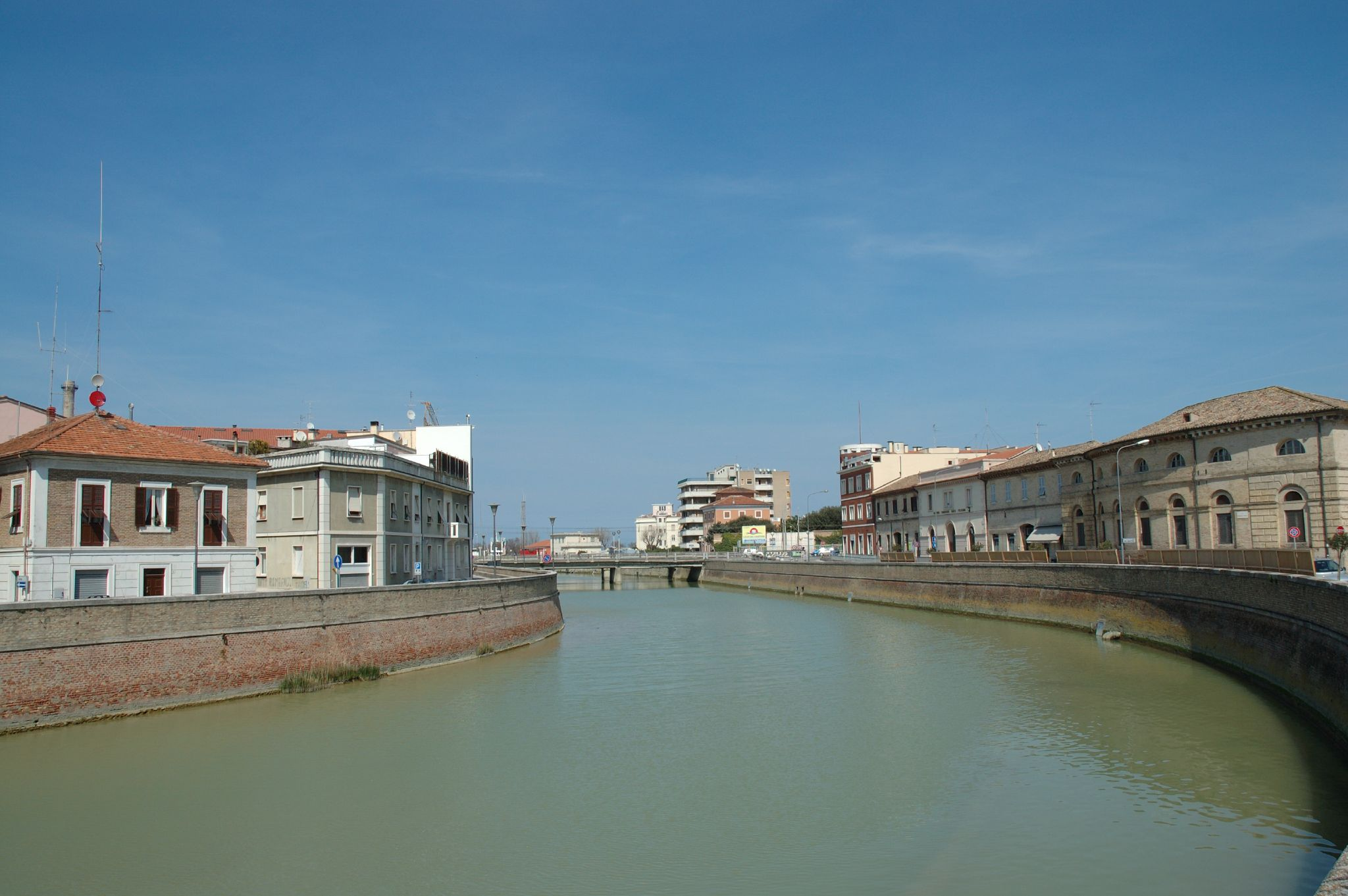 Il fiume Misa a Senigallia, Marche, Italia